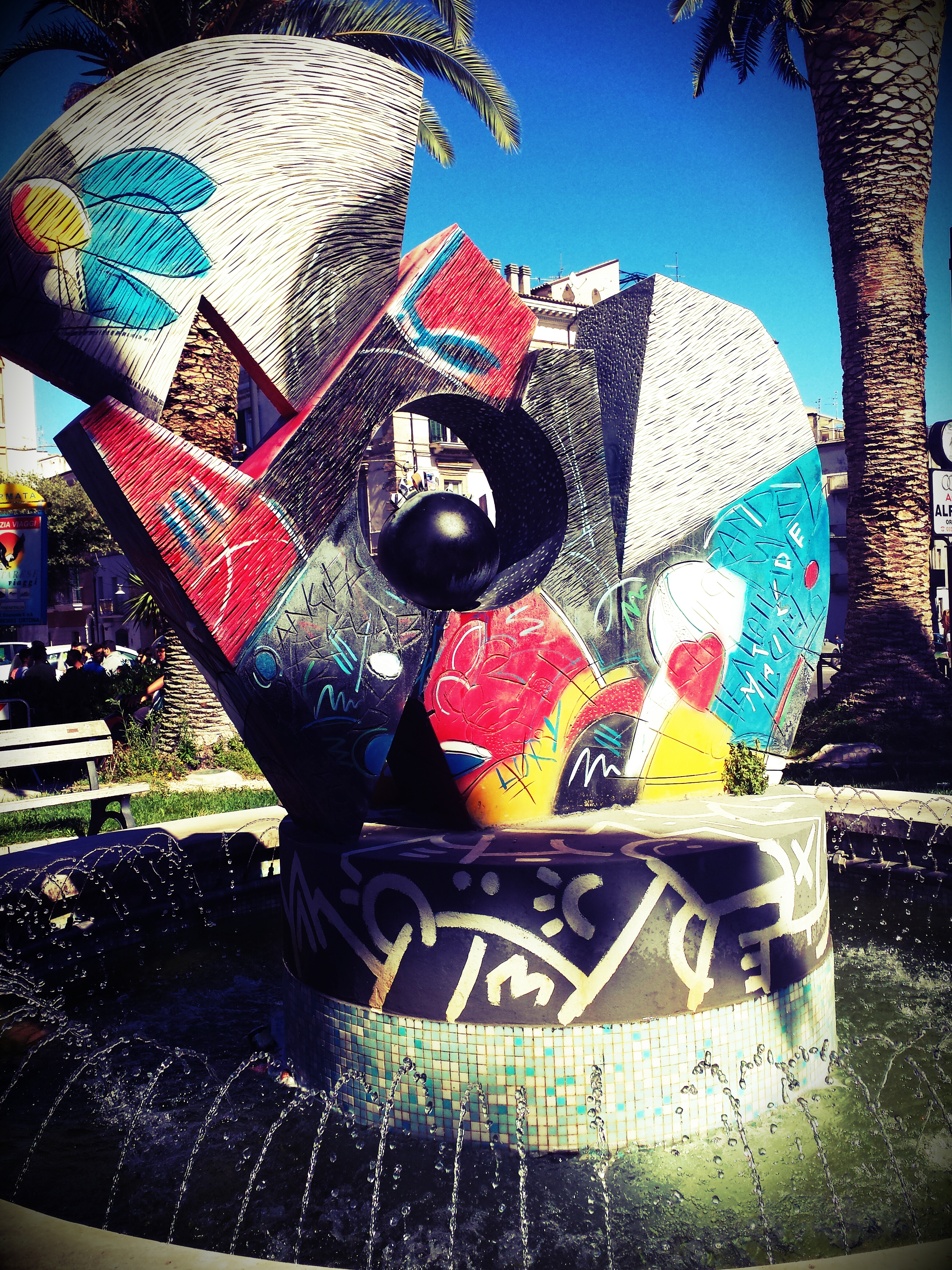 Fontana artistica "Vola Vola" di Porta Caldari. Ortona (CH) 2013